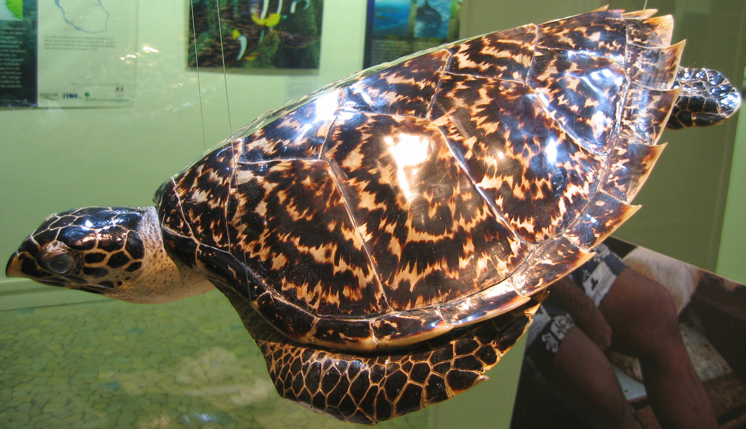 Tortue imbriquée naturalisée à l'aquarium de la porte dorée à Paris